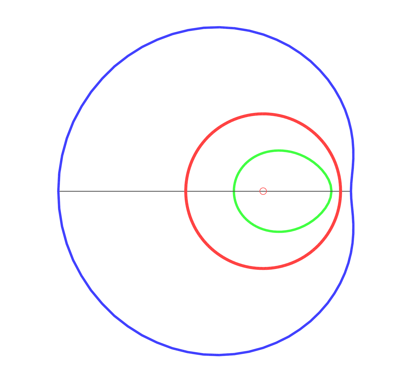 Existe una relación de inversión entre las dos partes de un óvalo cartesiano. La circunferencia de inversión tiene su centro en uno de los focos, y su radio es función de los parámetros de la curva.